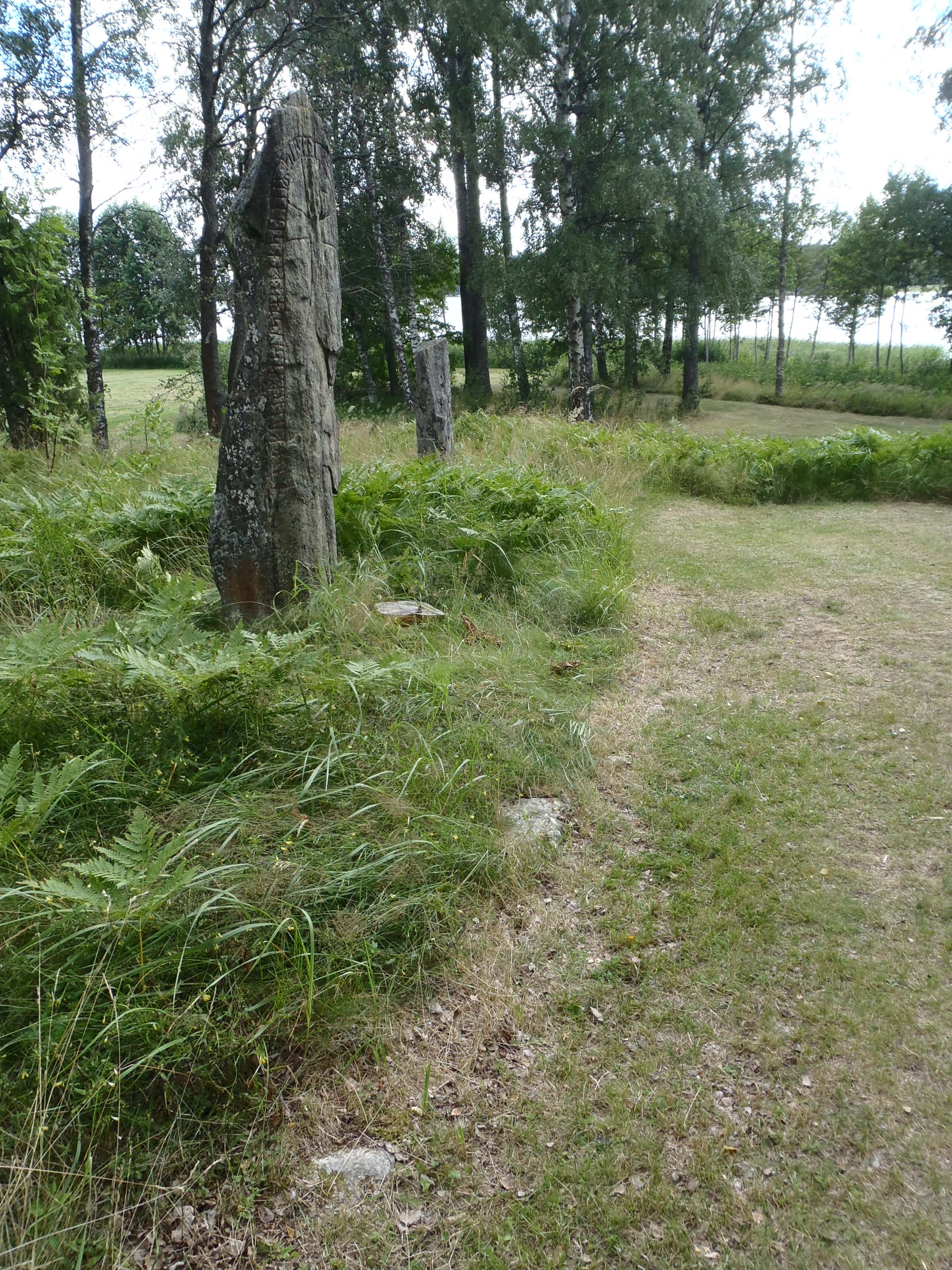 Den enda kända runstenen vid sjön Tisnaren är rest i Lyttersta i Västra Vingåkers socken vid gränsen mellan Södermanland och Östergötland. Fornminnen från järnåldern finns för övrigt rikligt på den södra sidan av sjön, i den del som tillhör Skedevi socken i Finspångs kommun. Södermanlands runinskrifter 73, i Västra Vingåkers socken, är första gången avbildad på en teckning av Johan Peringskiöld 1680, där även "Rüda by" i Östergötland syns på andra sidan av viken till "Tysnarn Lacus". Runstenen är rest nära mitten av en 12 m lång skeppssättning, ca 200 m väster om Lytterstabadet, ca 35 m från sjön. Stenen är ovanlig i den bemärkelsen, att den är rest av en kvinna över en annan kvinna. Runtexten lyder: "Torgunn reste denna sten efter Sigrid".